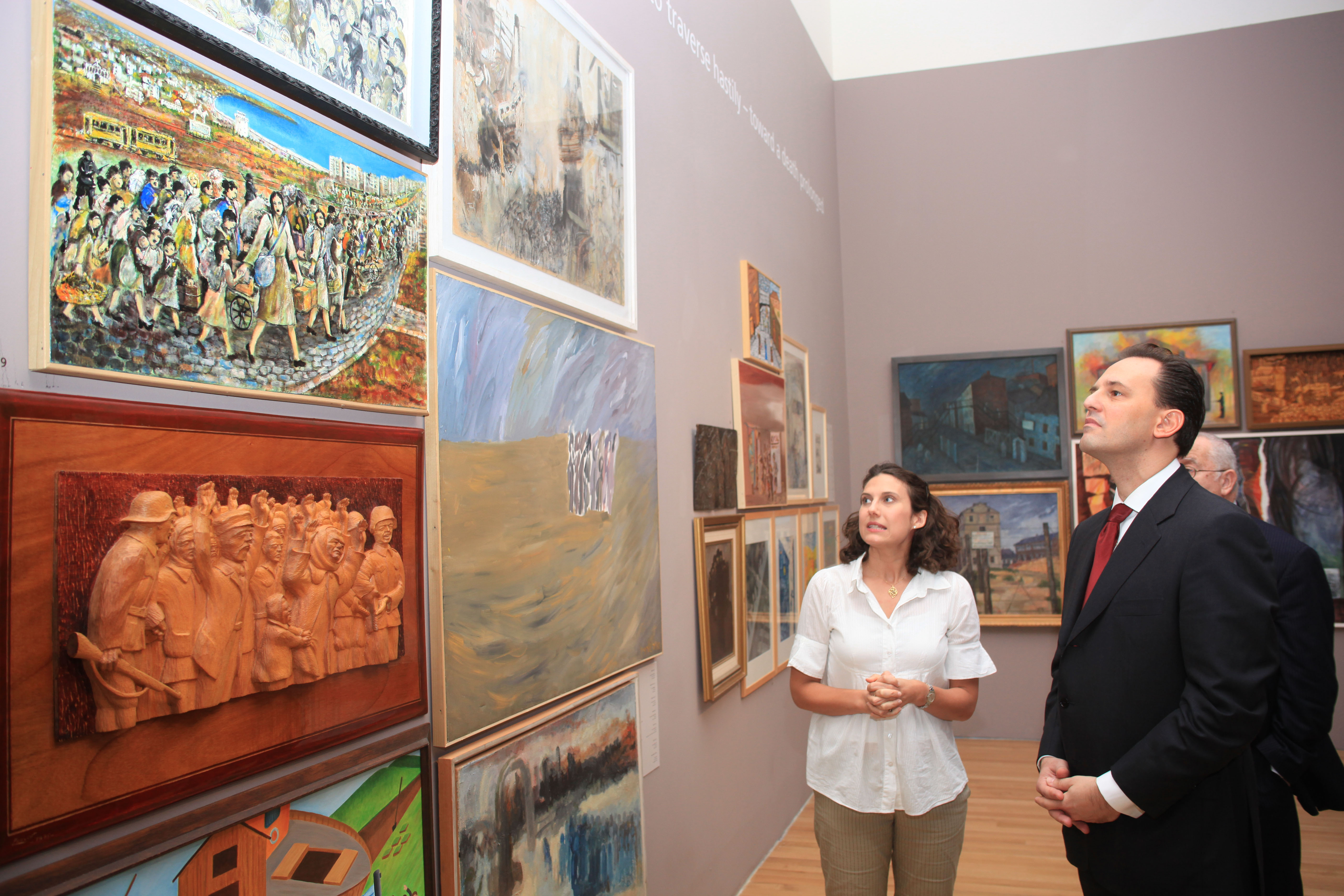 Επίσκεψη σε Μουσείο Ολοκαυτώματος Yad Vashem (18.10.2010) Visit to Holocaust Museum Yad Vashem (18.10.2010)